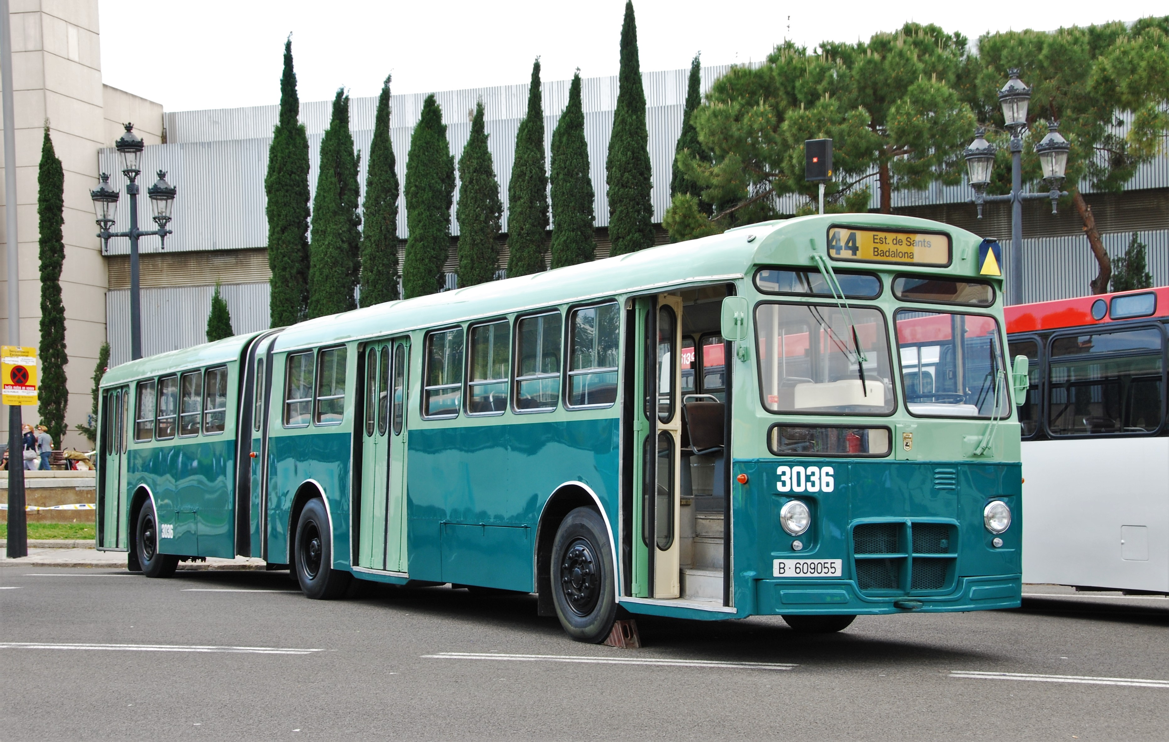 El autobús articulado 6035-A número 3036 de Transportes de Barcelona ha sido preservado por la Funcació TMB, y restaurado en su estado original, que implicó diversas reformas (faros, calandra, etcétera) y su repintado en el color "azul Porcioles".